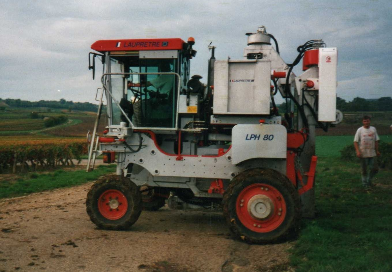 Tete de récolte montée sur enjambeur.